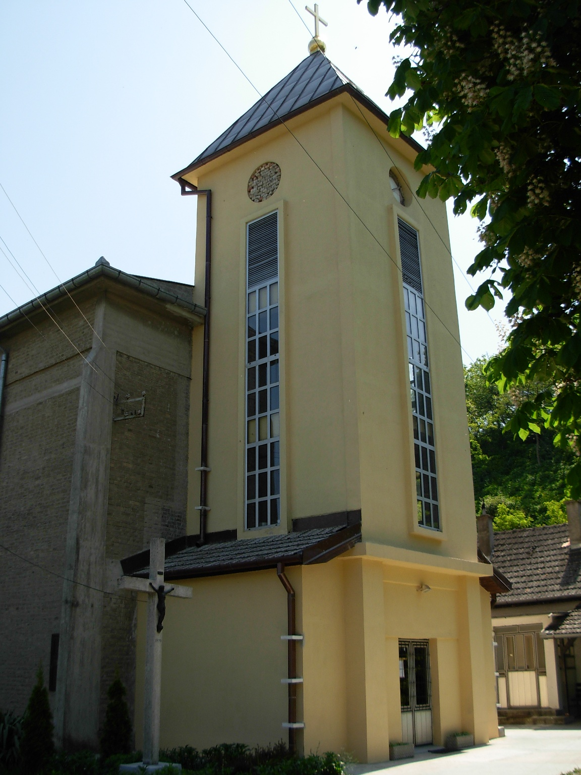 Crkva Svete Barbare u Beočinu.